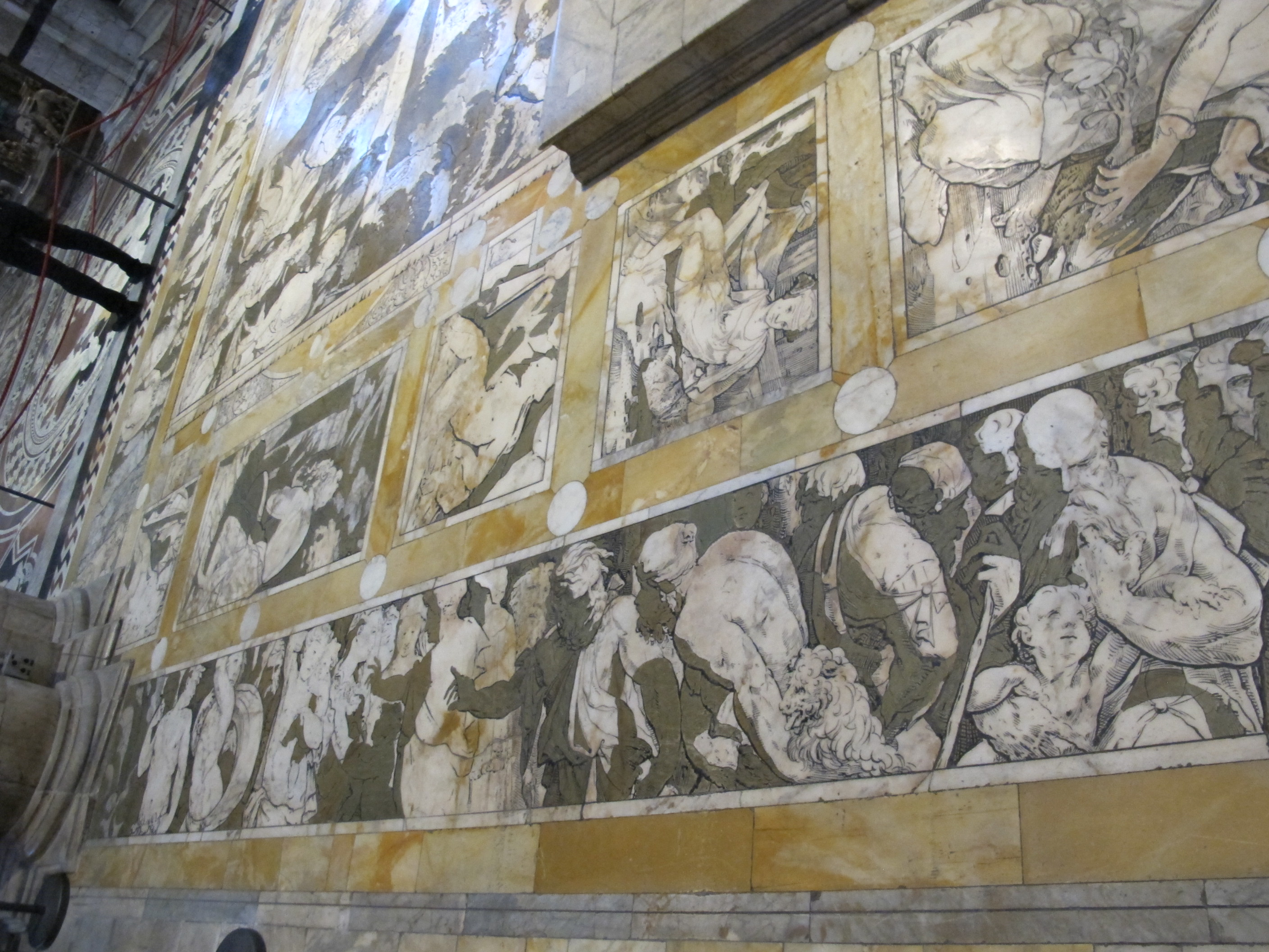 Beccafumi, fregio dell'altare